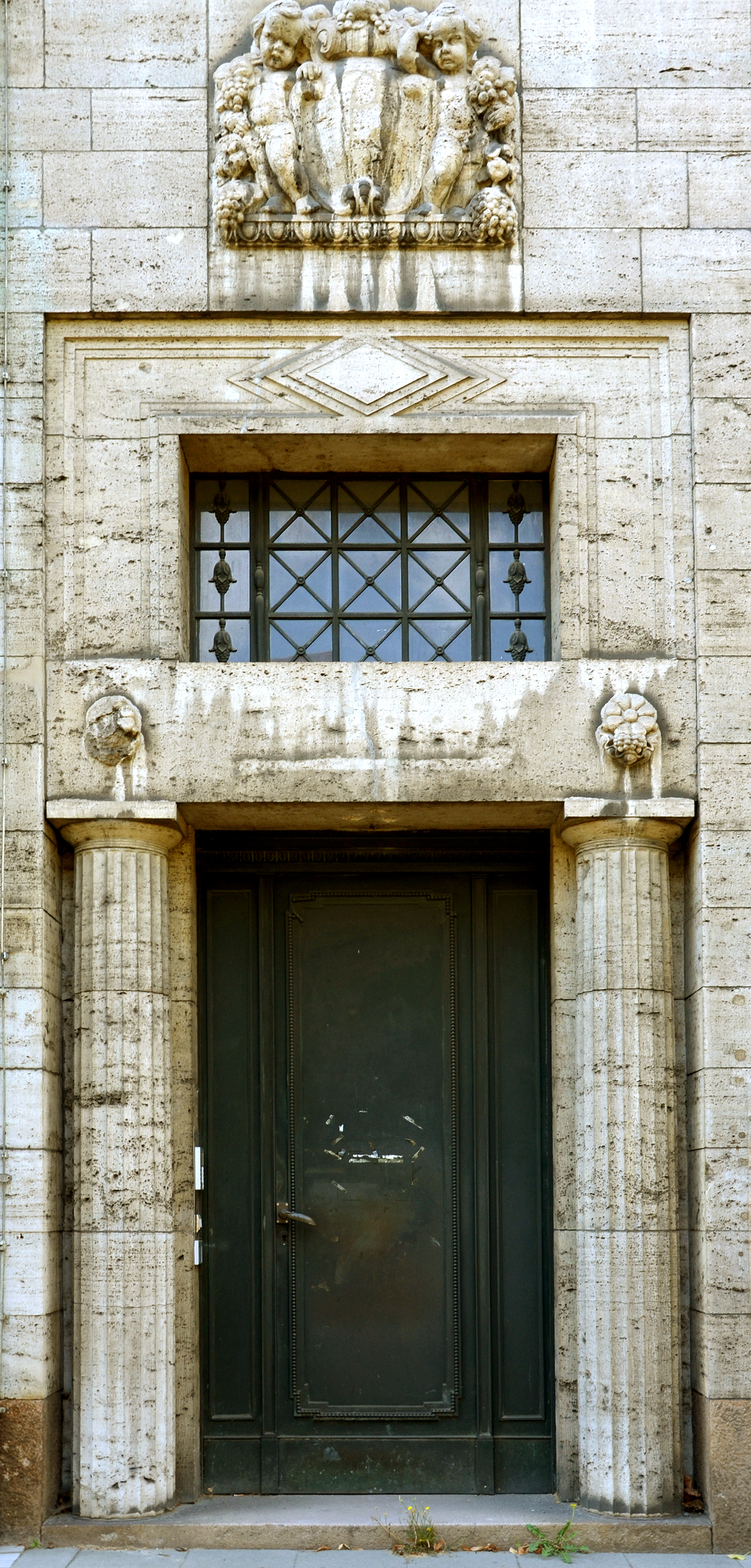 Hannover, Prinzenstraße 23, ehemaliges Bankhaus Caspar, erbaut 1910–1912 vom Architekten Emil Lorenz für den Bankier Bernhard Caspar – Detail eines der beiden Eingangs-Portale mit Halbsäulen aus Muschelkalk, Tür und Fenstergitter in Bronze, darüber Relief mit Putten und Früchten und den Initialen CB des Bauherrn; Das Gebäude hat als einer von nur wenigen historischen Bauten im Zentrum Hannovers den Zweiten Weltkrieg überstanden, soll jedoch 2014 für einen Neubau abgerissen werden.